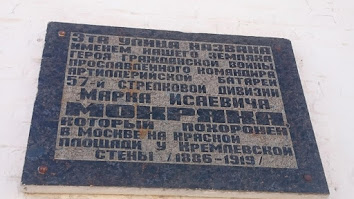 Меморіальна дошка на фасаді школи №1 Мокряку М.І.